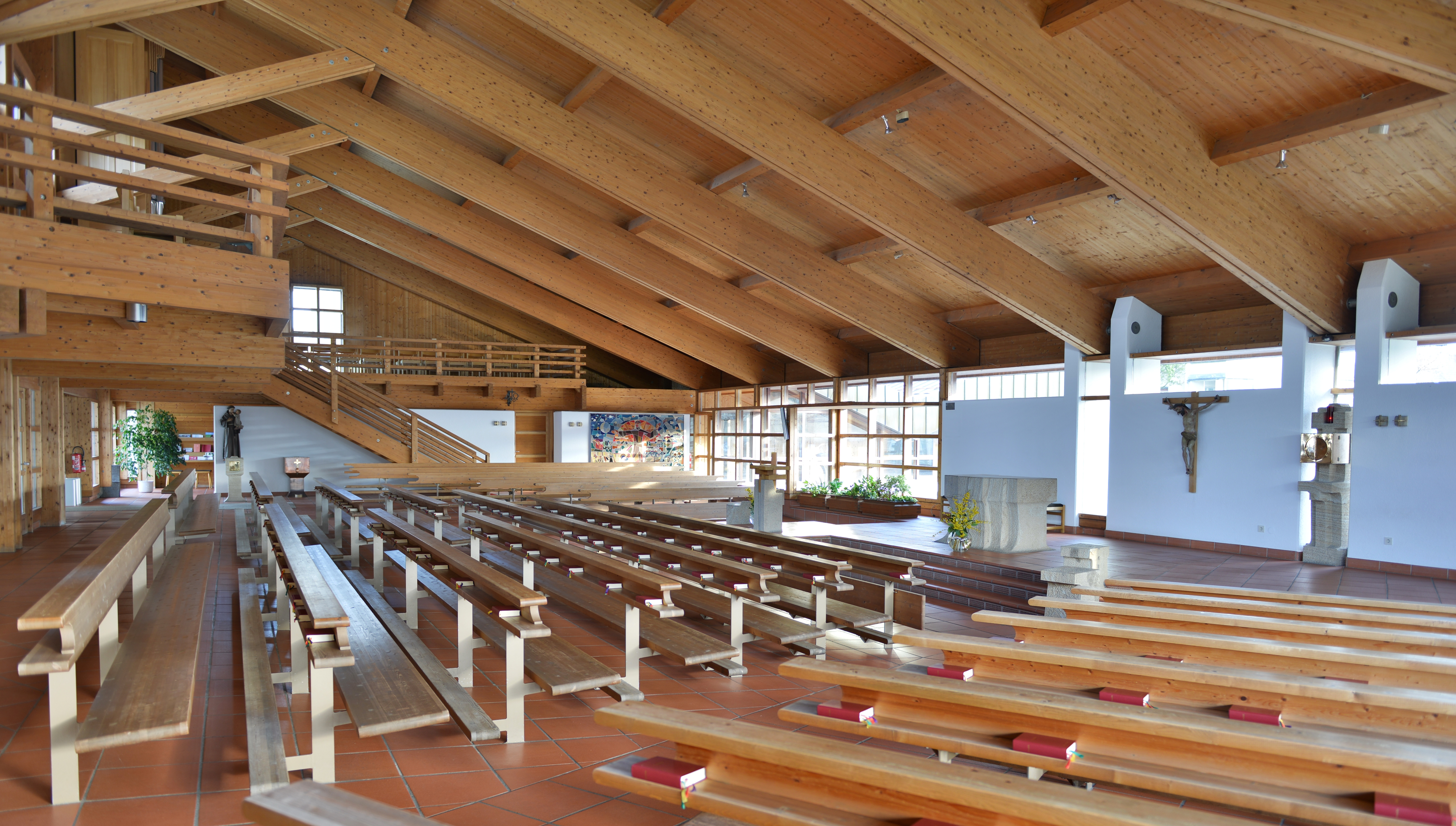 Pfarrkirche hl. Nikolaus in Hinterburg Nr.: 1 in Fußach.